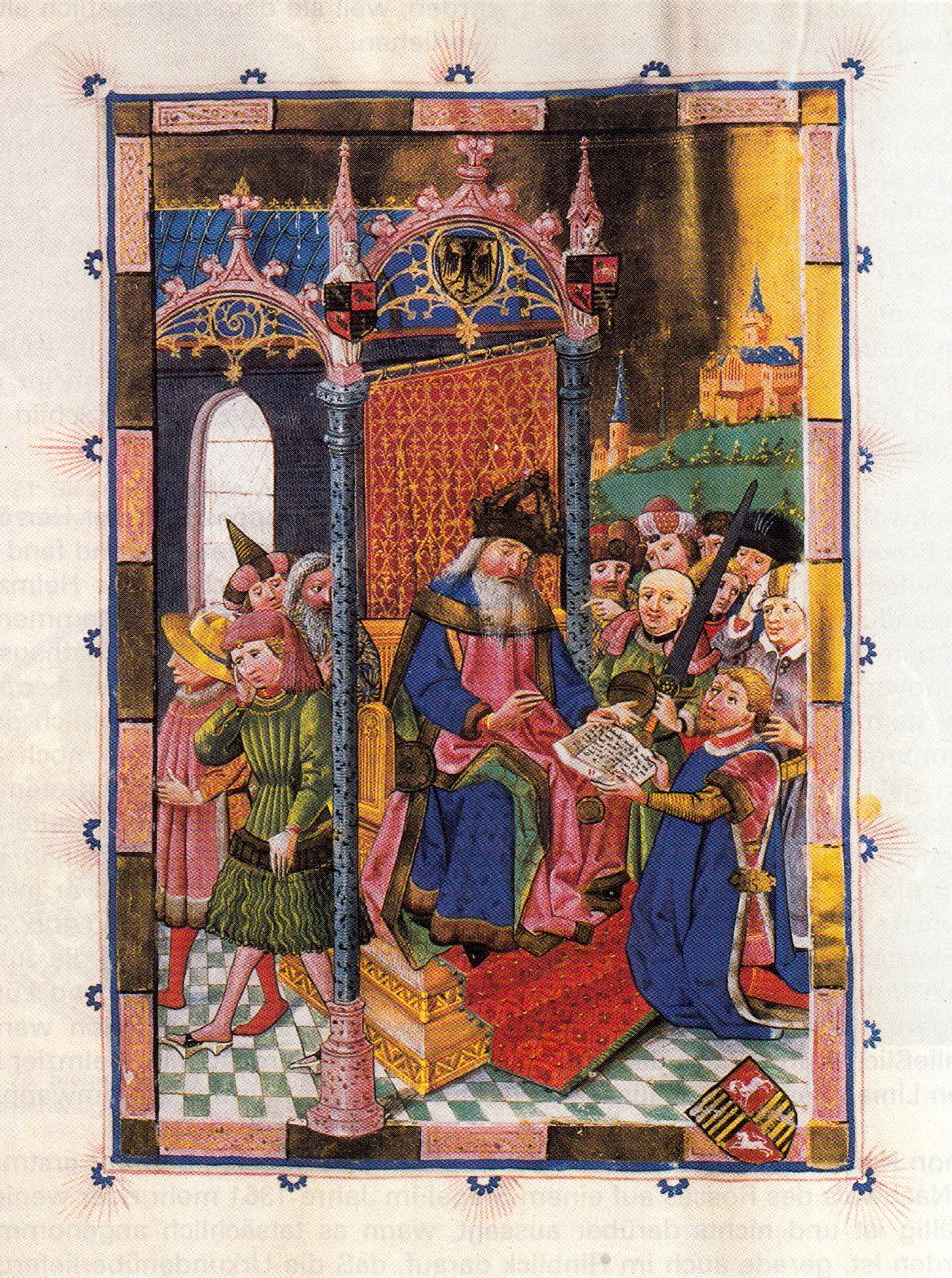 Kaiser Karl IV. belehnt die askanischen Herzöge von Wittenberg mit dem Fürstentum Lüneburg.